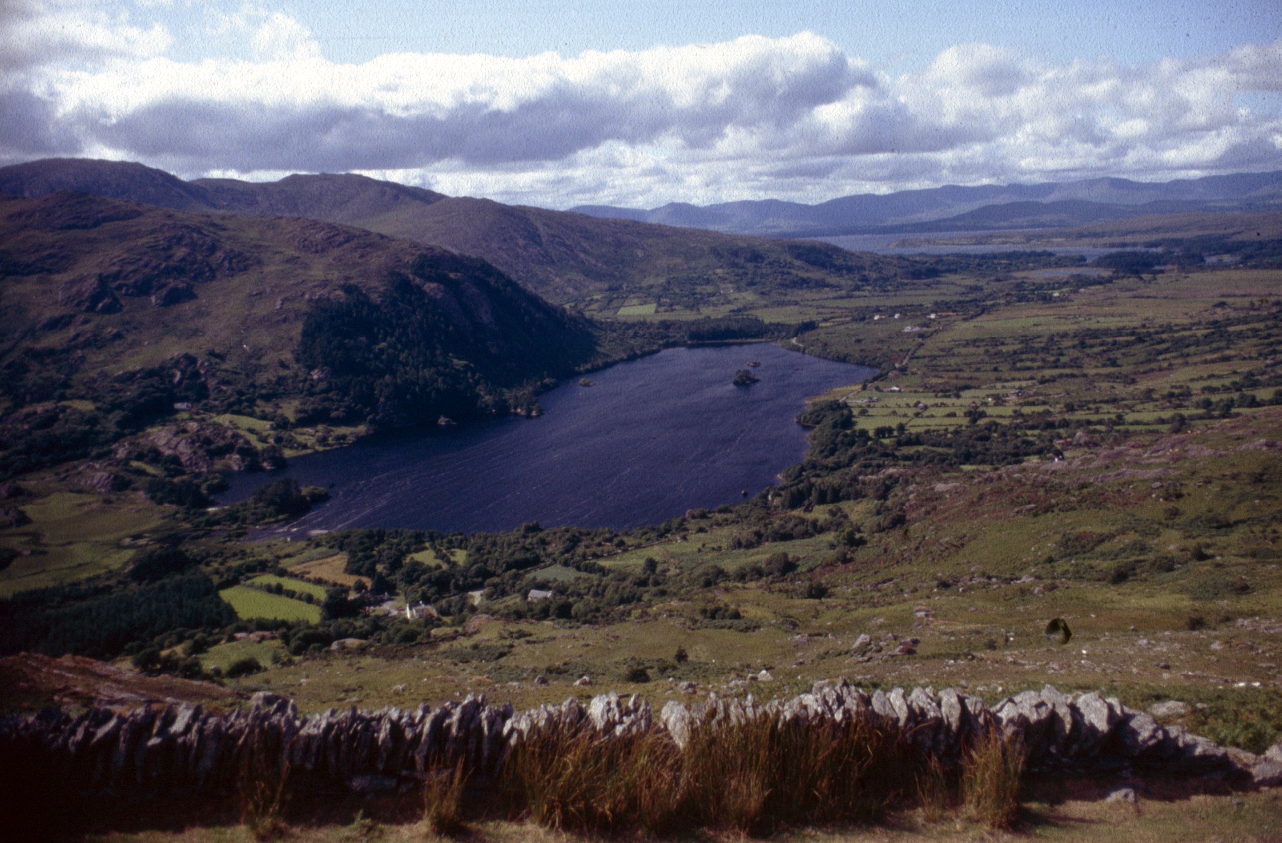 Healy Pass, County Cork